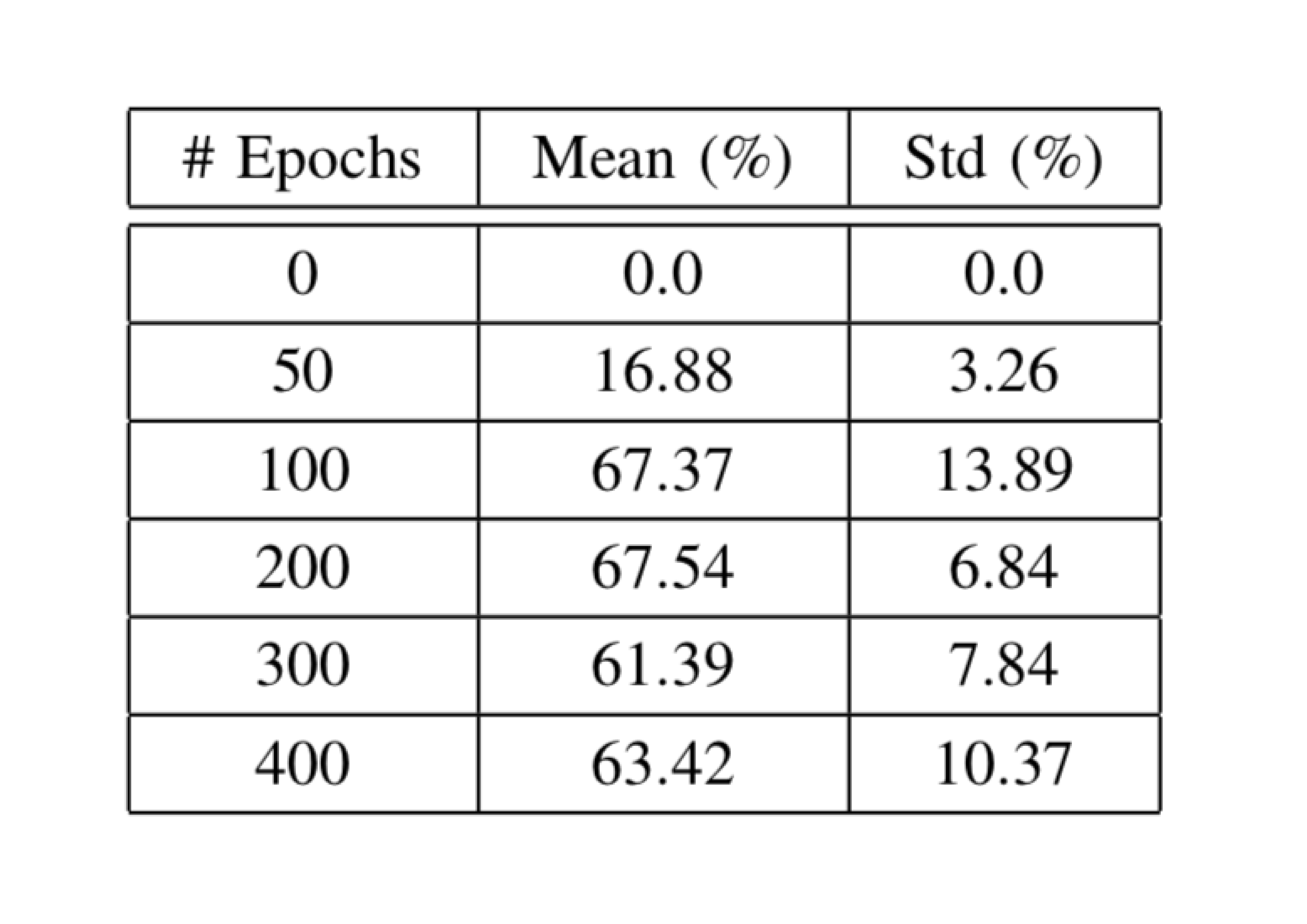 ПРОЦЕНТ ПРОЦЕДУР БЛОКИРОВКИ НА ЧИСЛО УЧЕБНЫХ ЭПОХ В ПЯТИ РАЙН